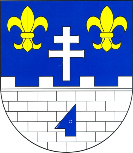 znak,Třebenice , okres Třebíč